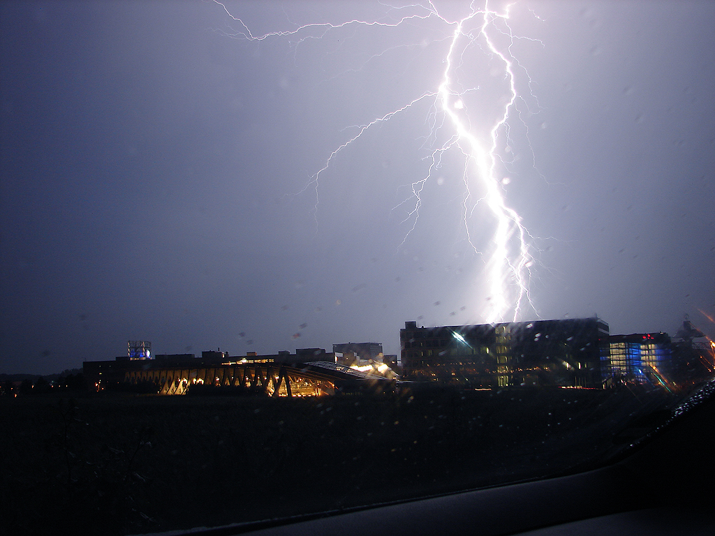 Blitzeinschlag auf dem Messegelände in Hannover